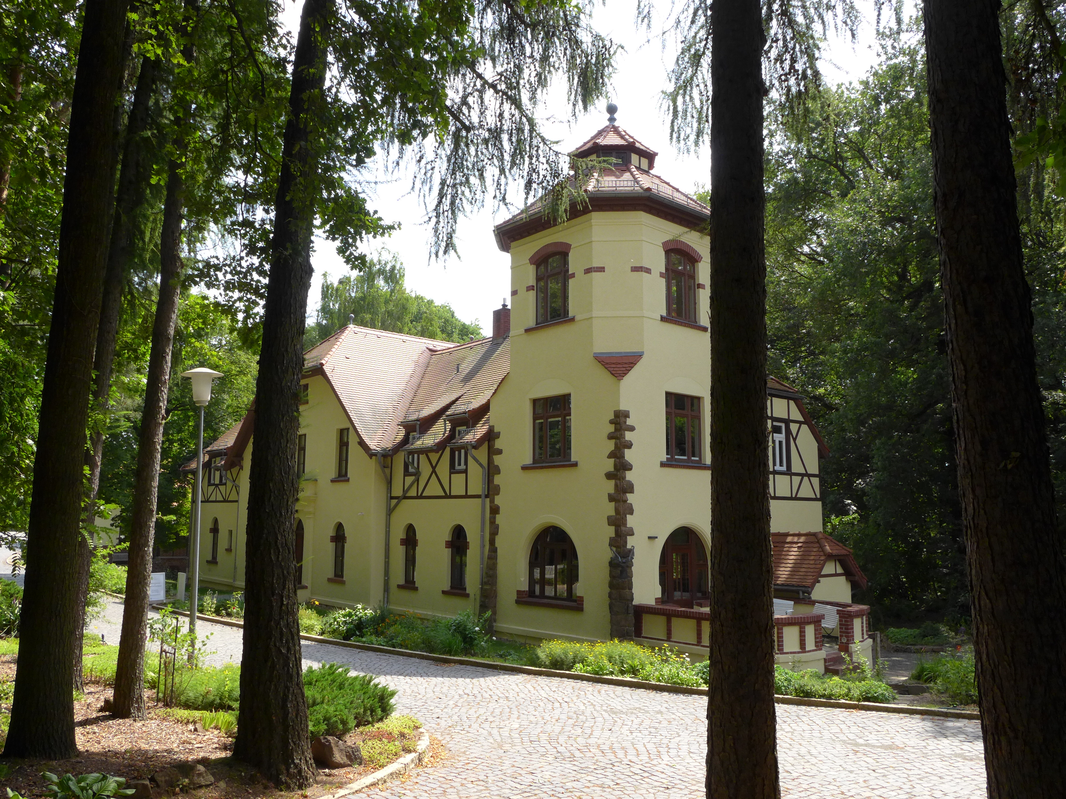 Wilhelm-Ostwald-Parko en Großbothen, Germanio. Domo "Energie" (energio).